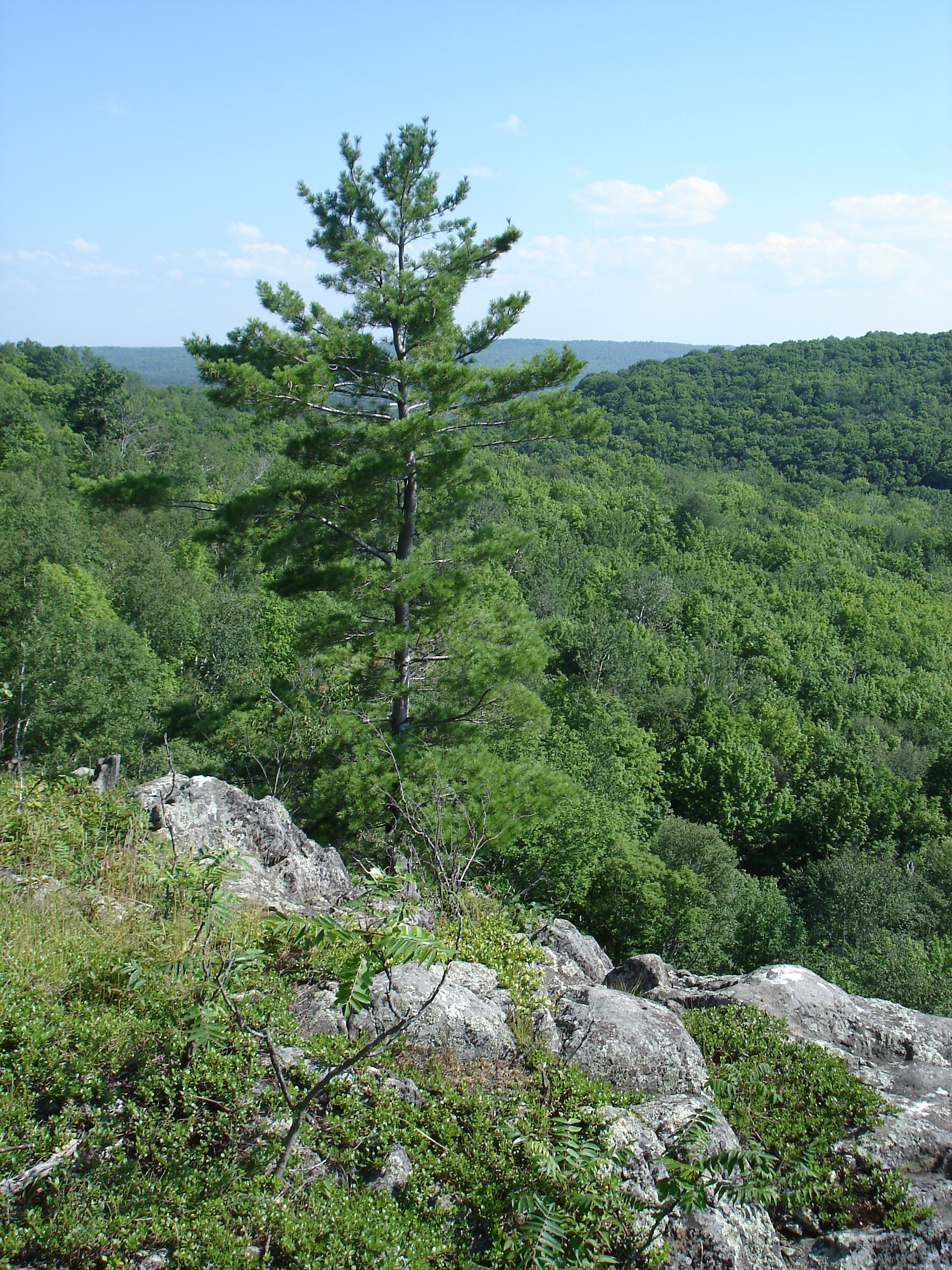 Penokee Bluff